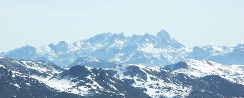 Macizo Occidental de Picos de Europa